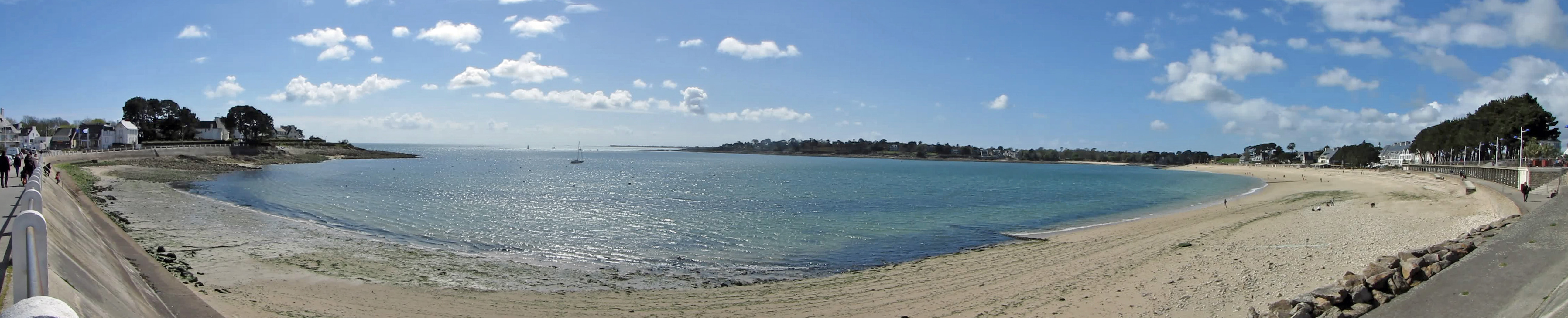 Baie de Bénodet